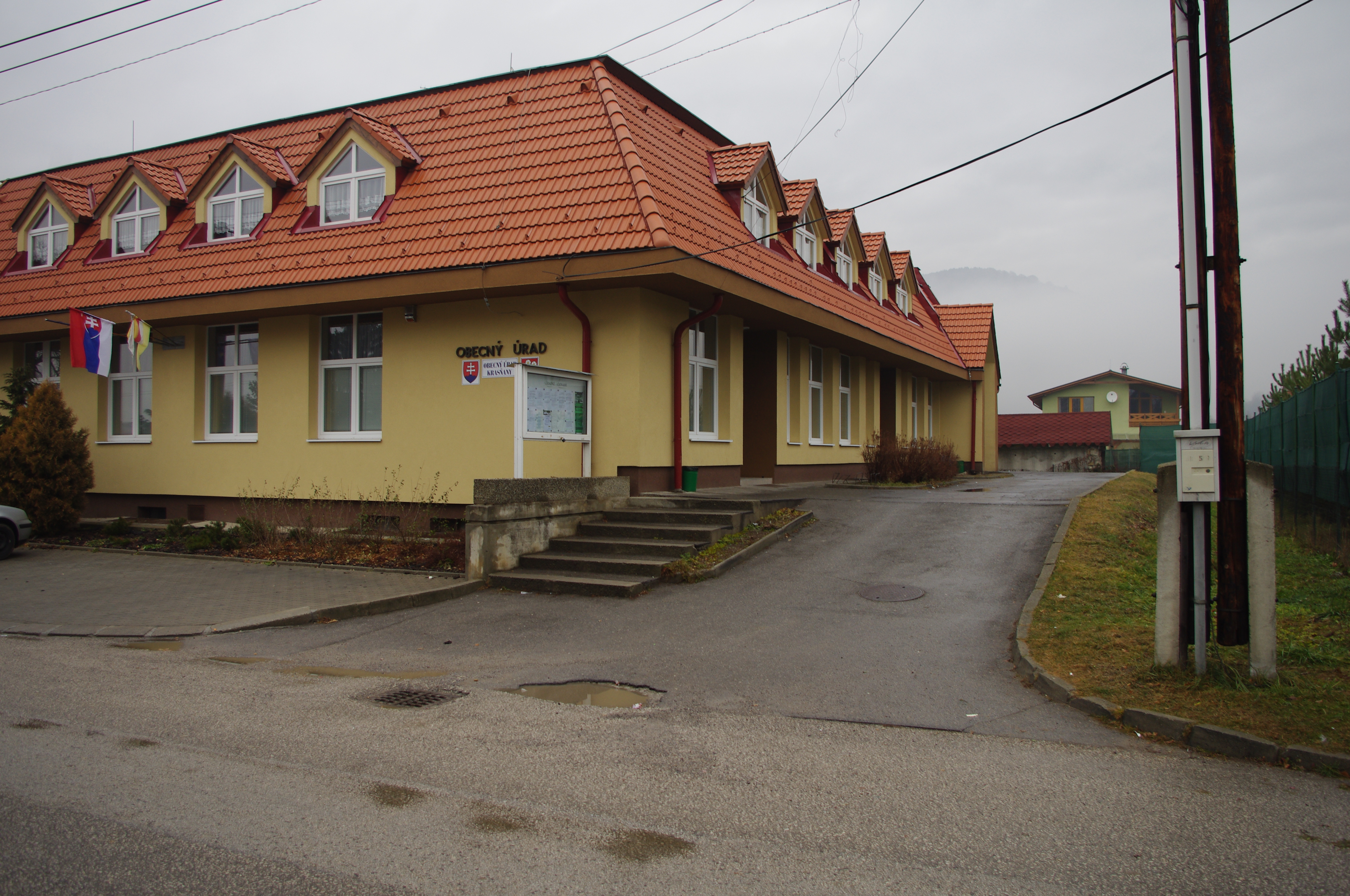 Ob. urad